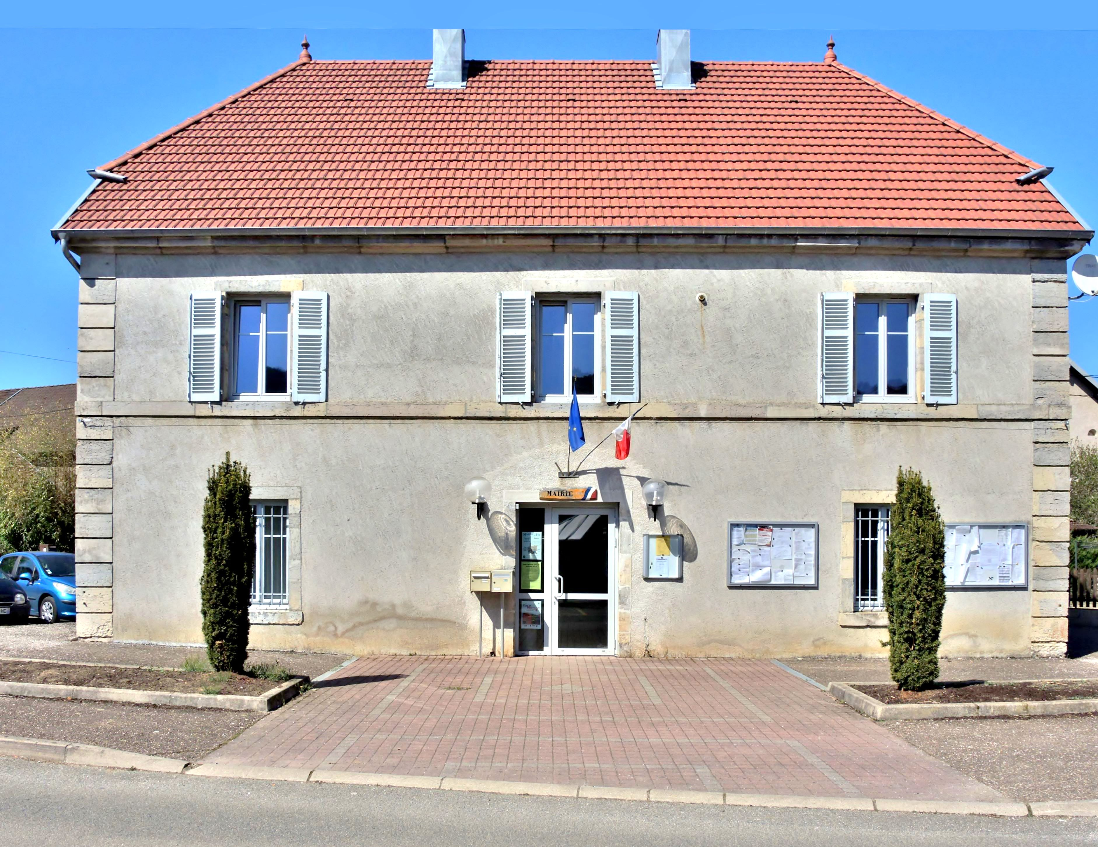 Mairie du village de Vaire-Arcier. Doubs.